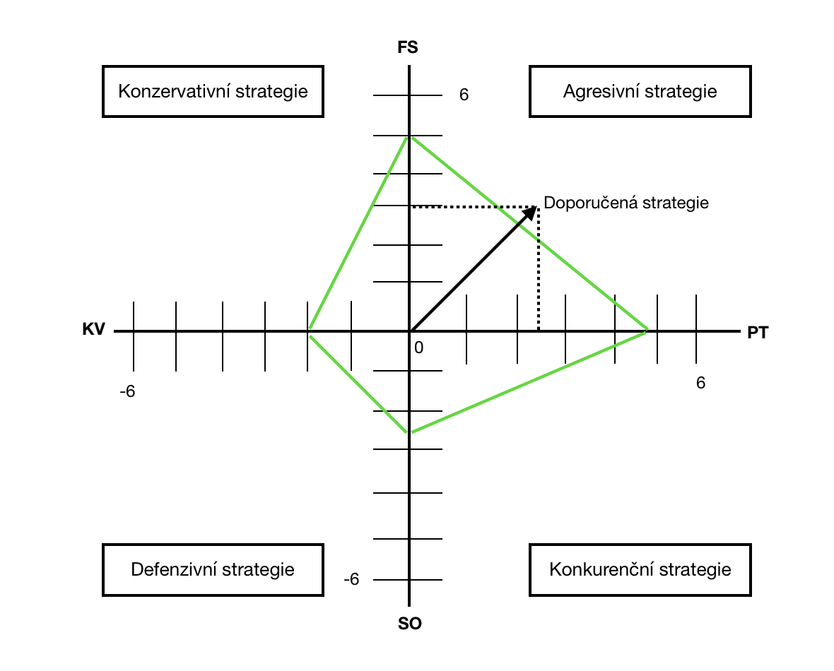 Určení strategie SPACE analýzy